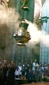 Le Botafumeiro de la cathedral de Saint Jacques de Compostelle